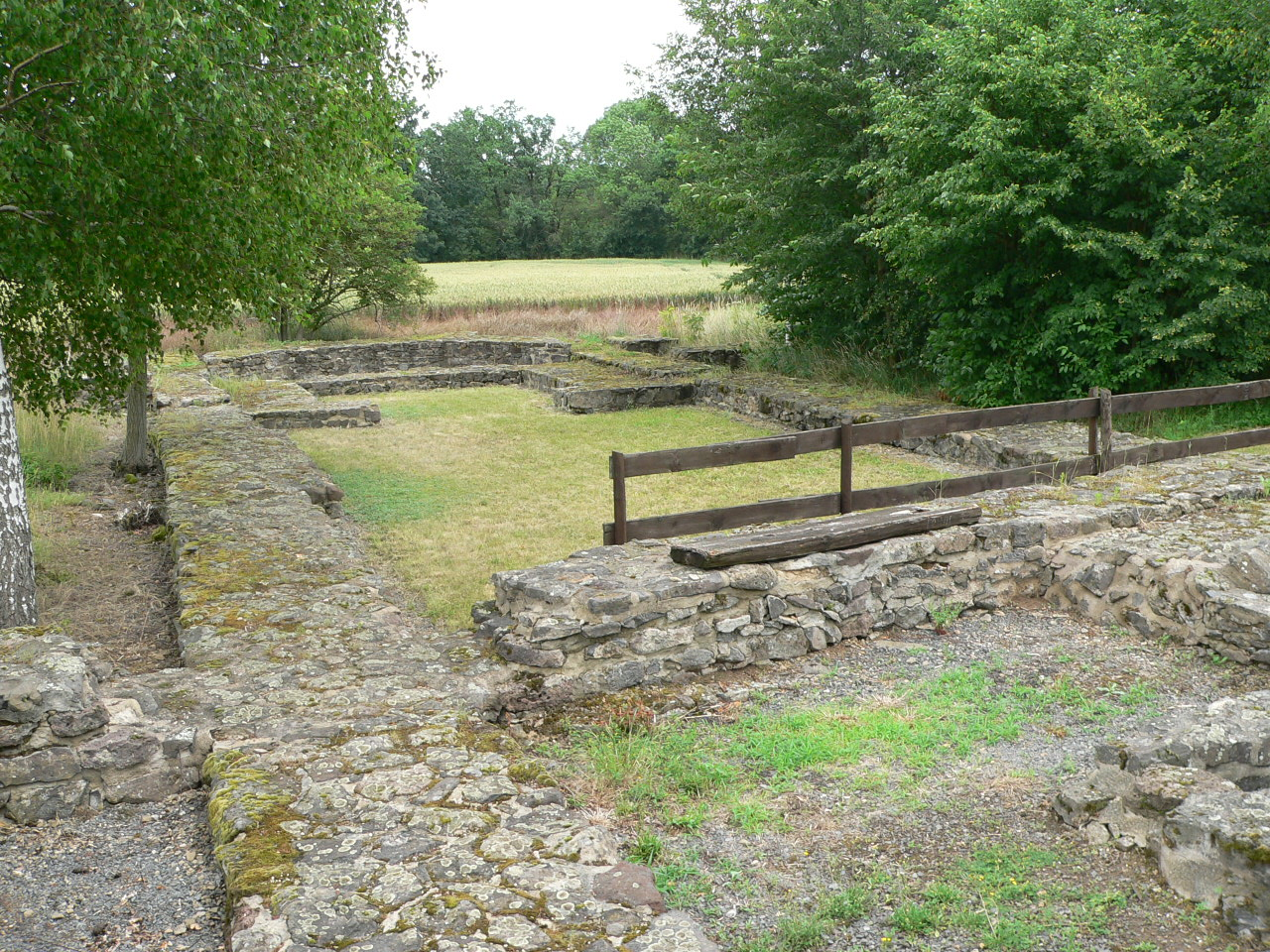 Grundmauern der Kirche in der Ruine Burg Arnsburg, Hessen, Deutschland.